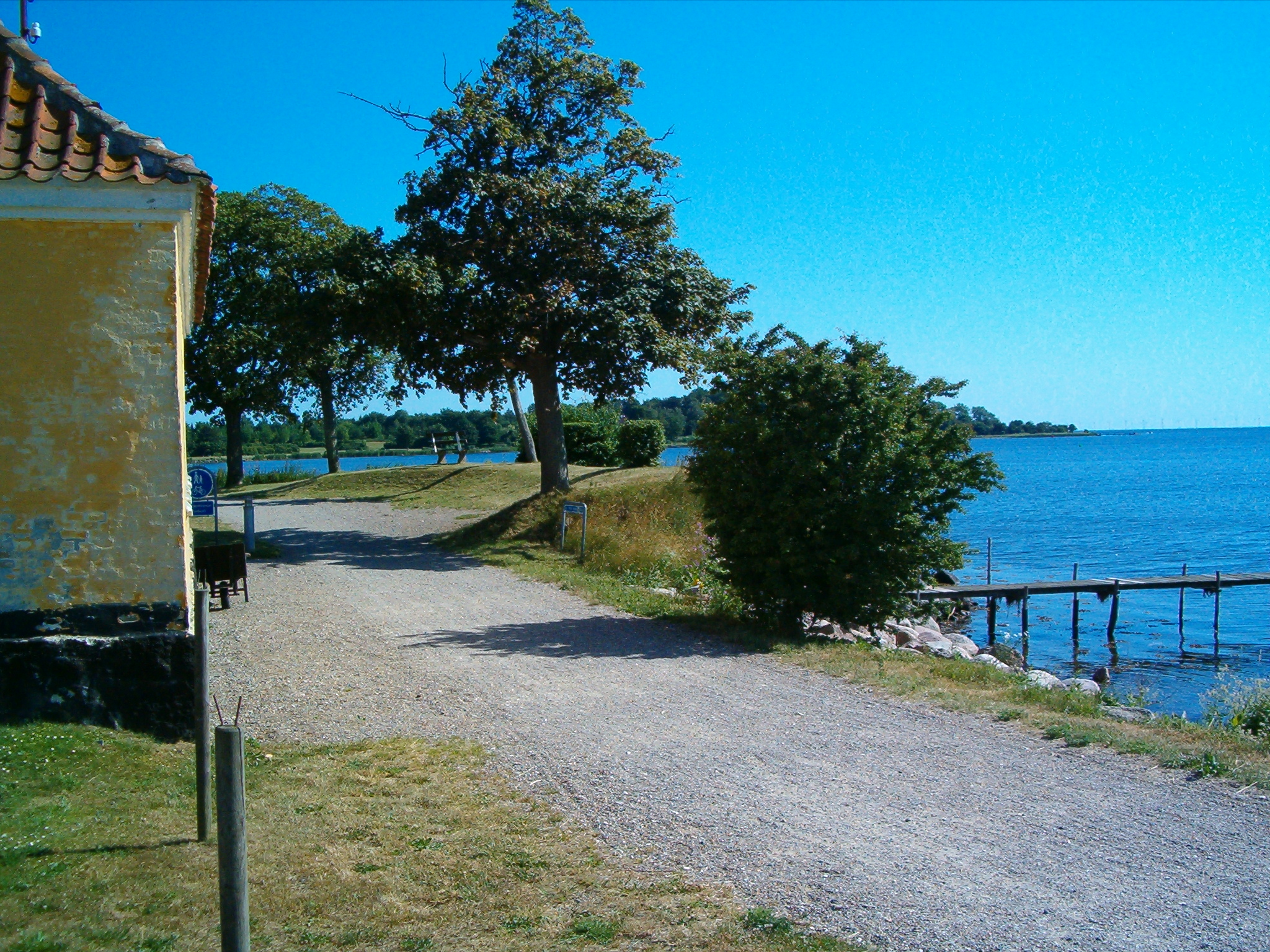 Skanseanlæg ved indløbet til Nysteds havn fra krigen mod England i 1801. --Erik Damskier 19:34, 7 July 2006 (UTC)